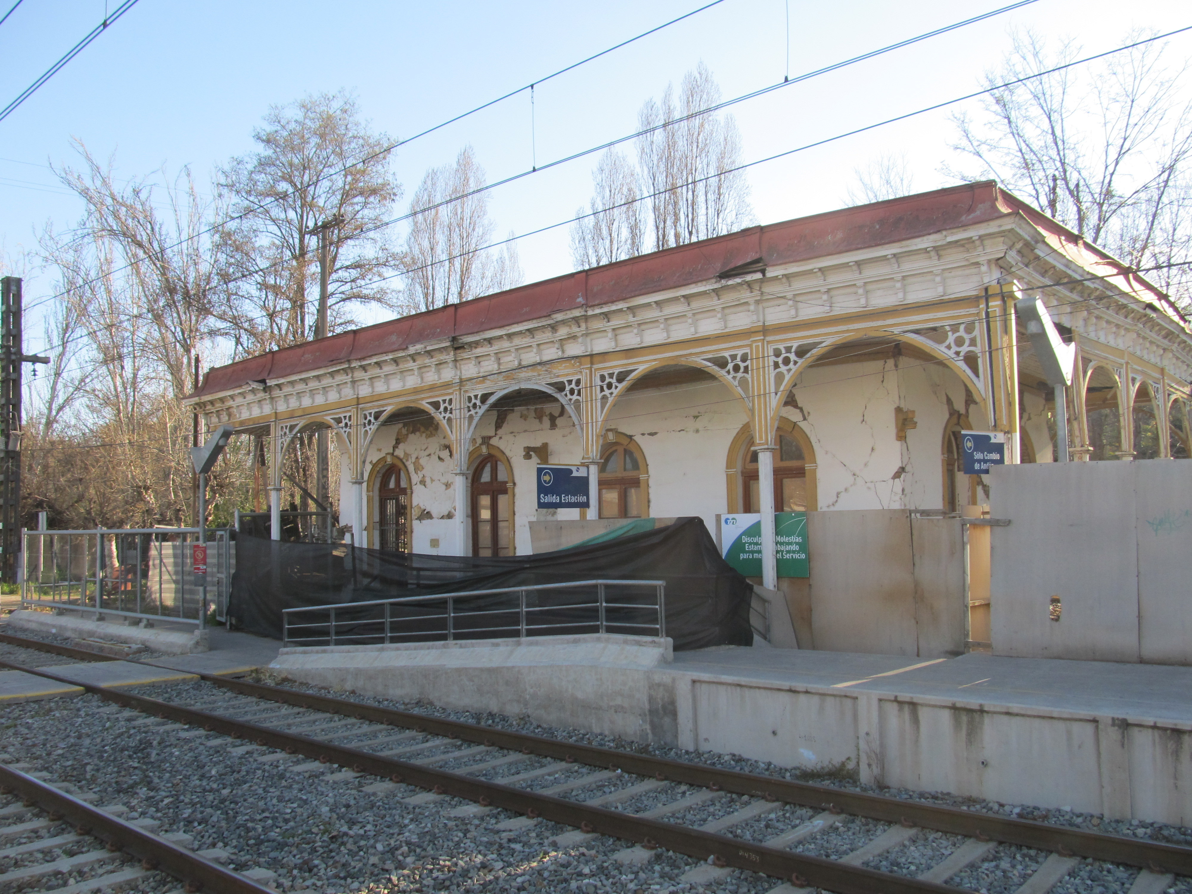 Estación de ferrocarriles de San Francisco de Mostazal This is a photo of a national monument in Chile: 359